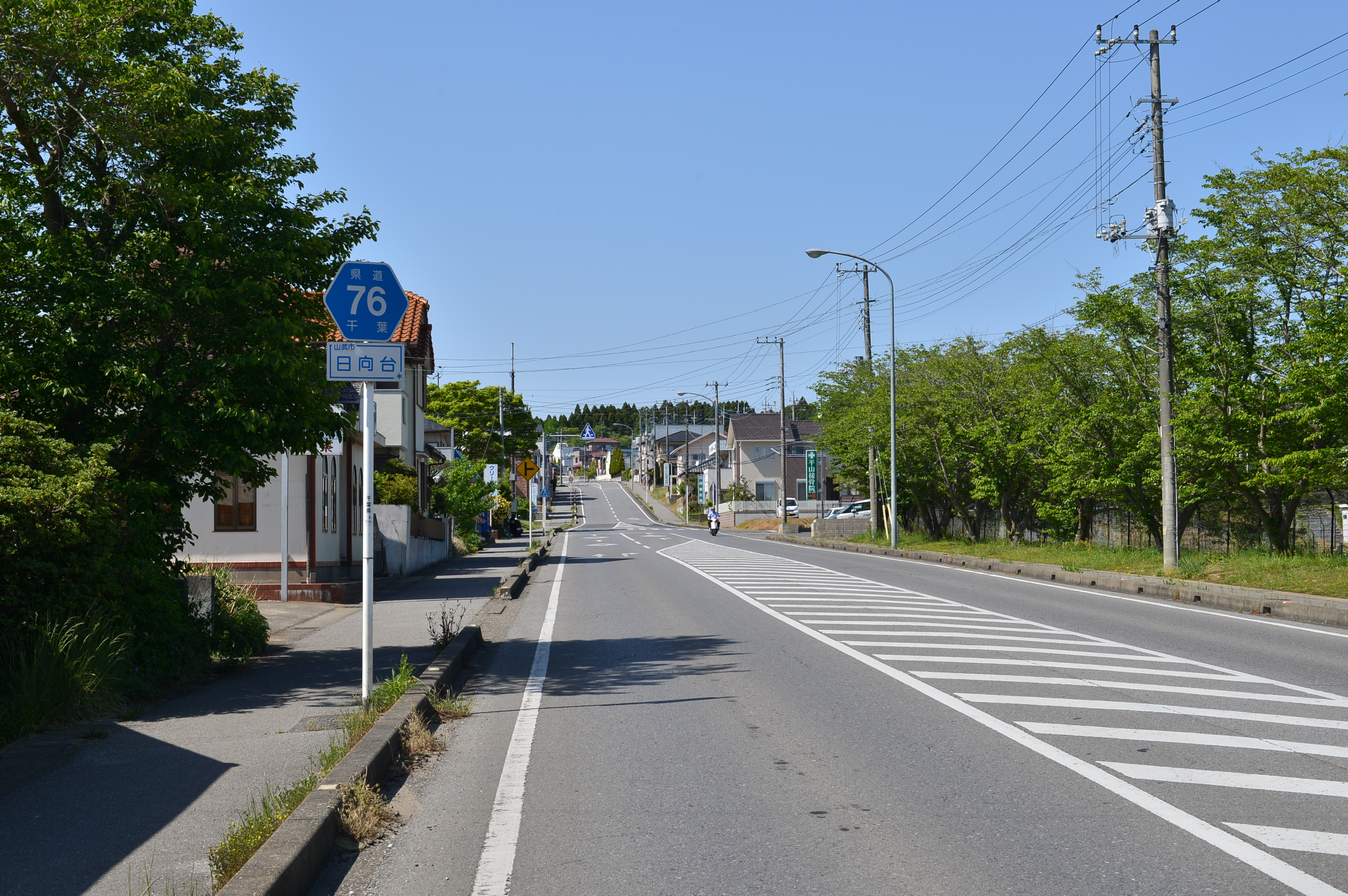 千葉県道76号成東酒々井線（山武市日向台）